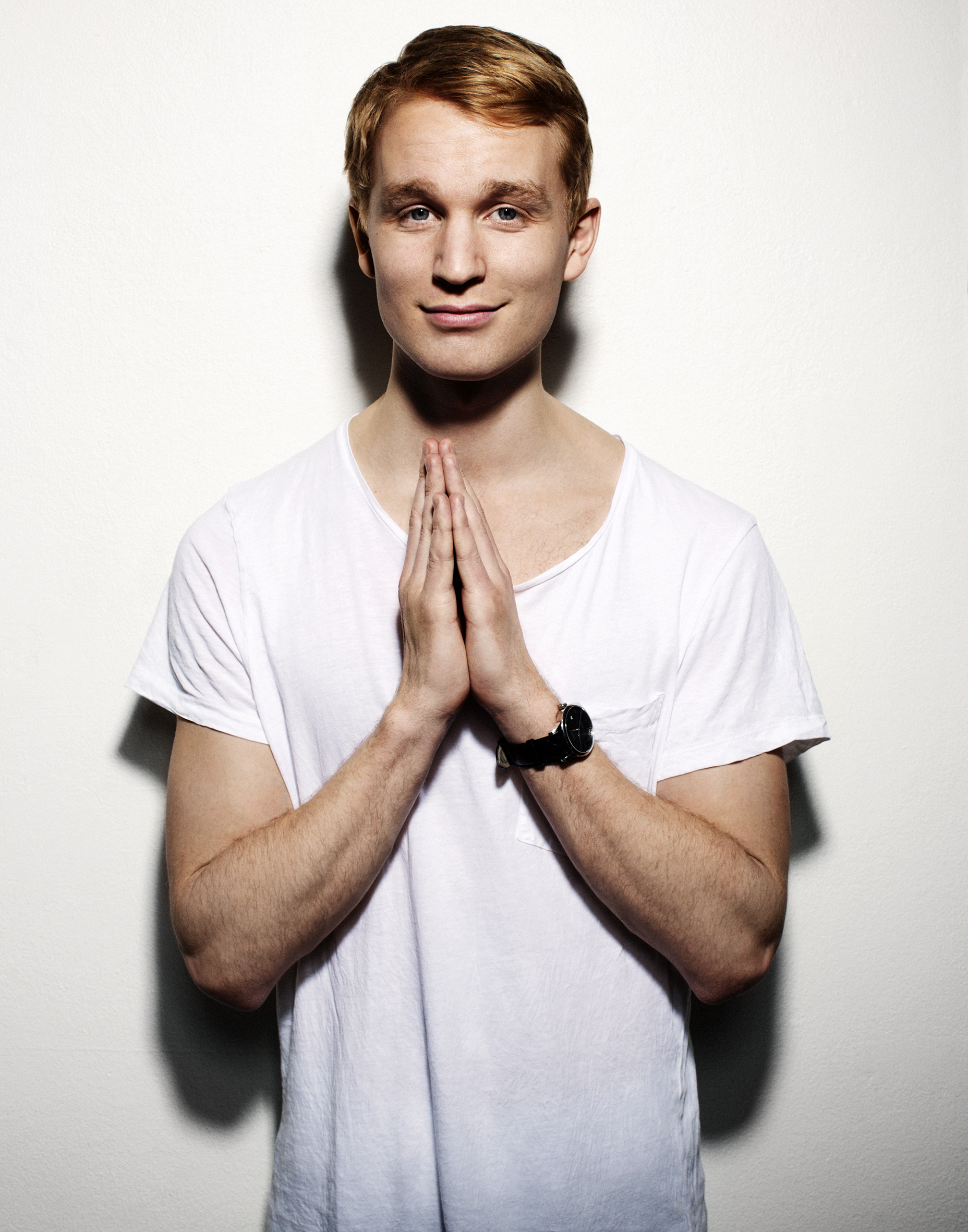 Komikern Björn Gustafsson.